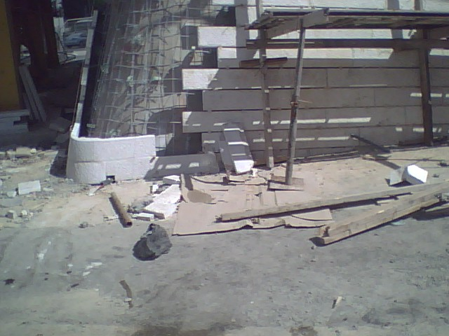 Jerusalem